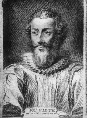 François Viète